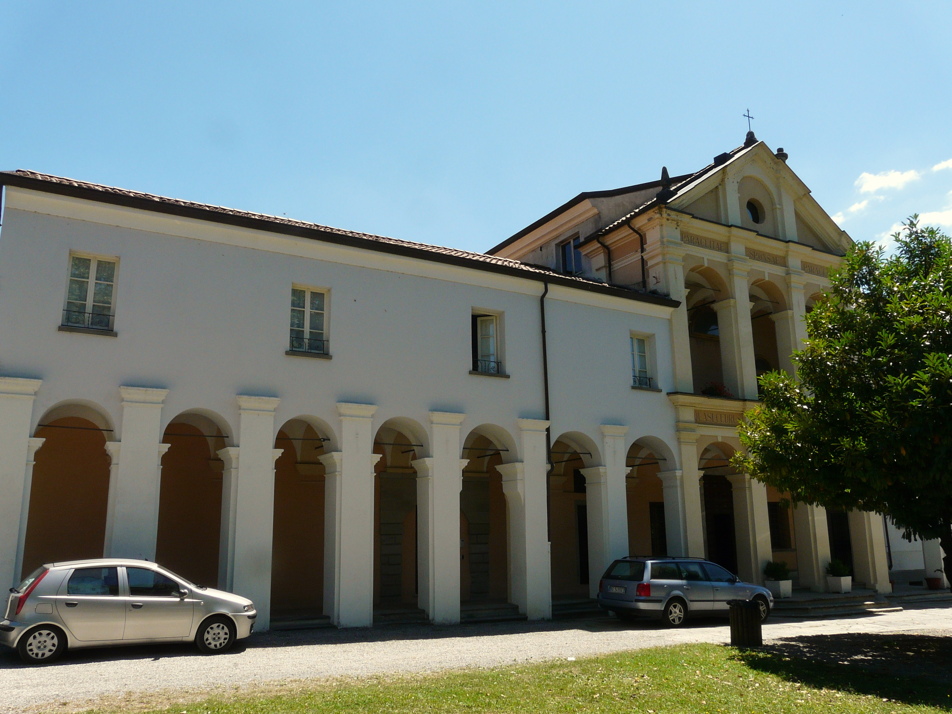 Immagini varie del santuario della Madonna di San Marco, Bedonia, Emilia Romagna, Italia